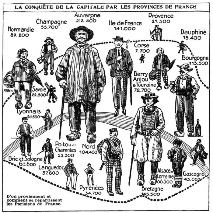 Communautés provinciales à Paris en 1932.